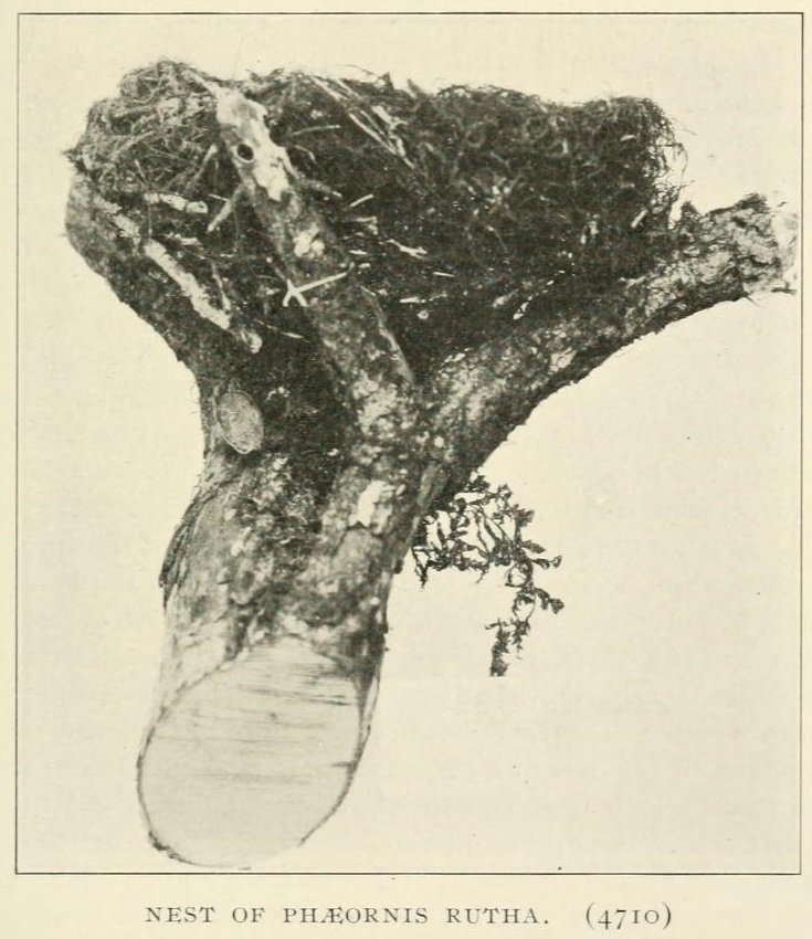 Gniazdo klarnetnika bladego (Myadestes lanaiensis rutha)